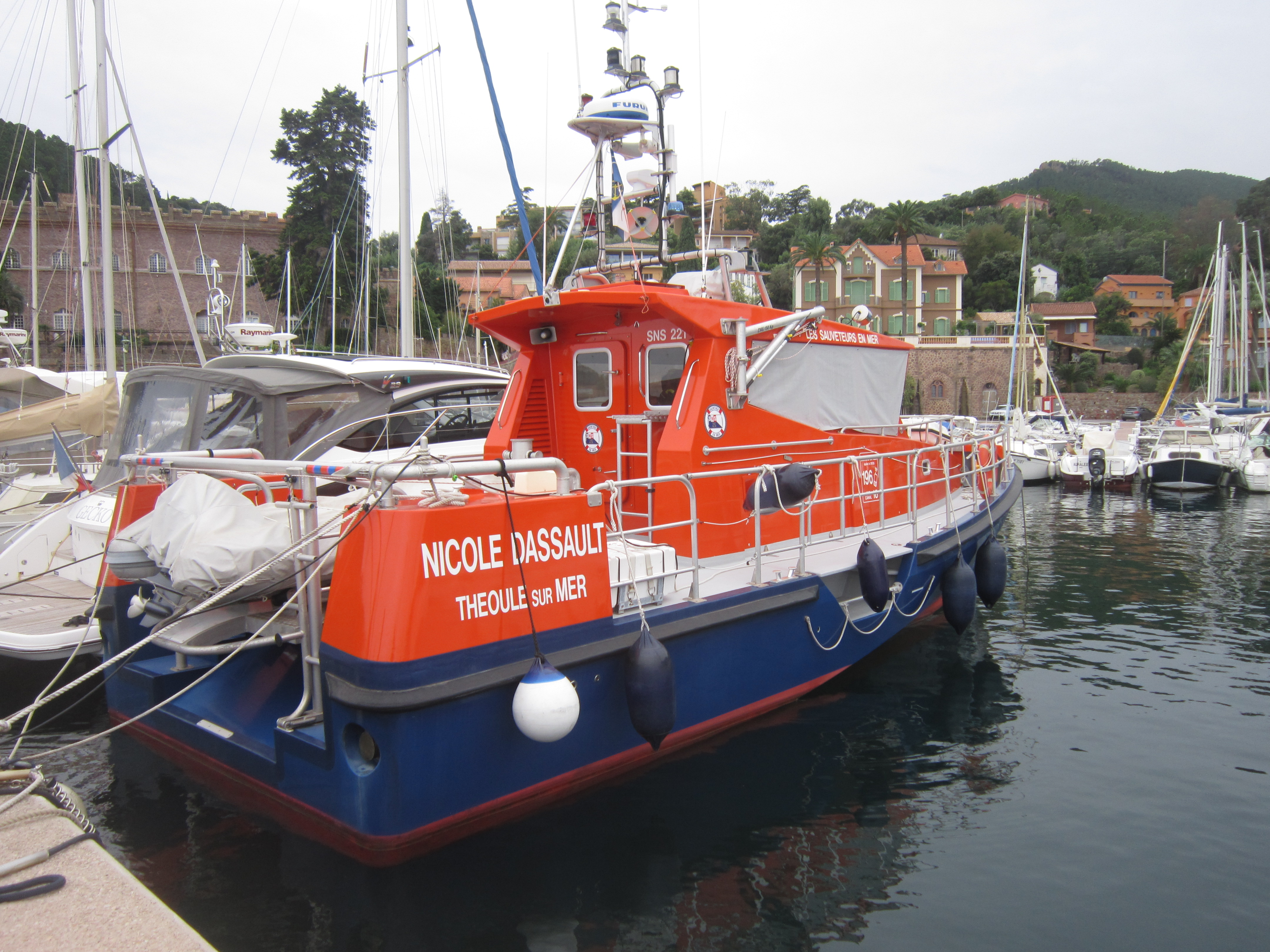 Le bateau de sauvetage de la SNSM "Nicole Dassault" à Théoule-sur-Mer (ainsi dénommé car financé par Serge Dassault, qui avait une résidence à Théoule-sur-Mer).